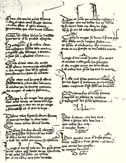 Hoja del códice del Archivo Histórico Nacional (España) que contiene tres poemas: El pecado original - ¡Ay Jerusalén! - mandamientos